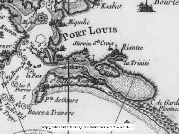 Gavres et Port Louis